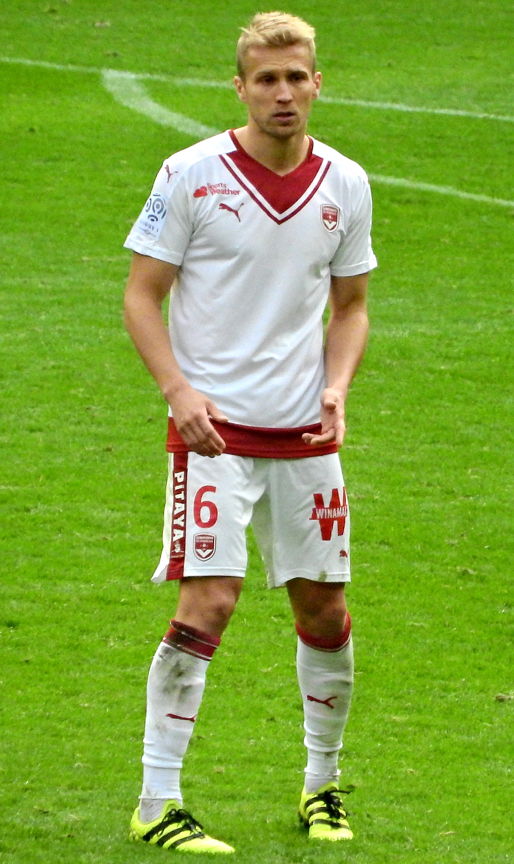 Igor Lewczuk.